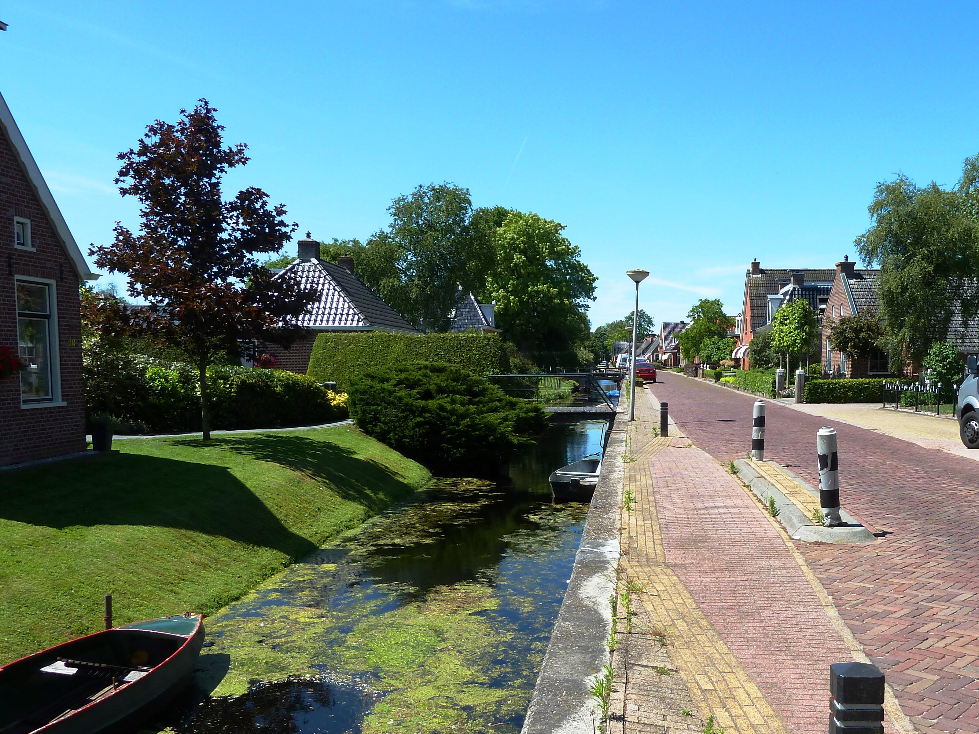 Hoofdstraat van Veenwoudsterwal (Friesland, Nederland).